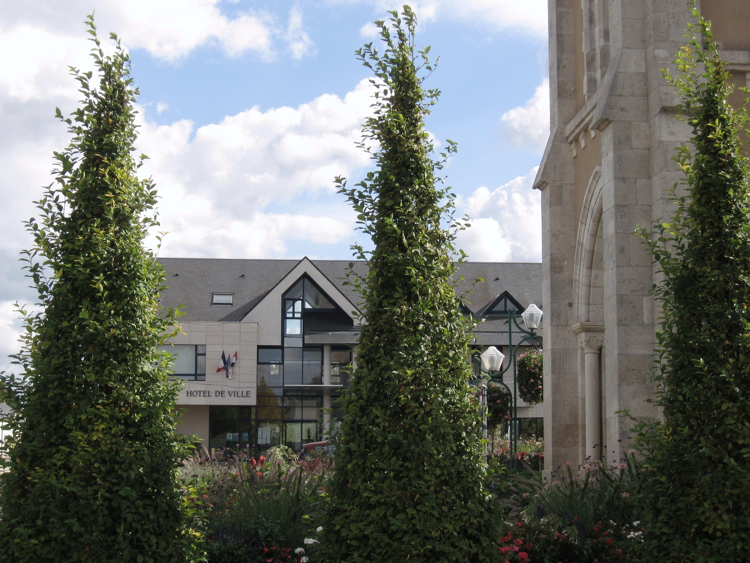 Hôtel de Ville, Ormes, Loiret, France